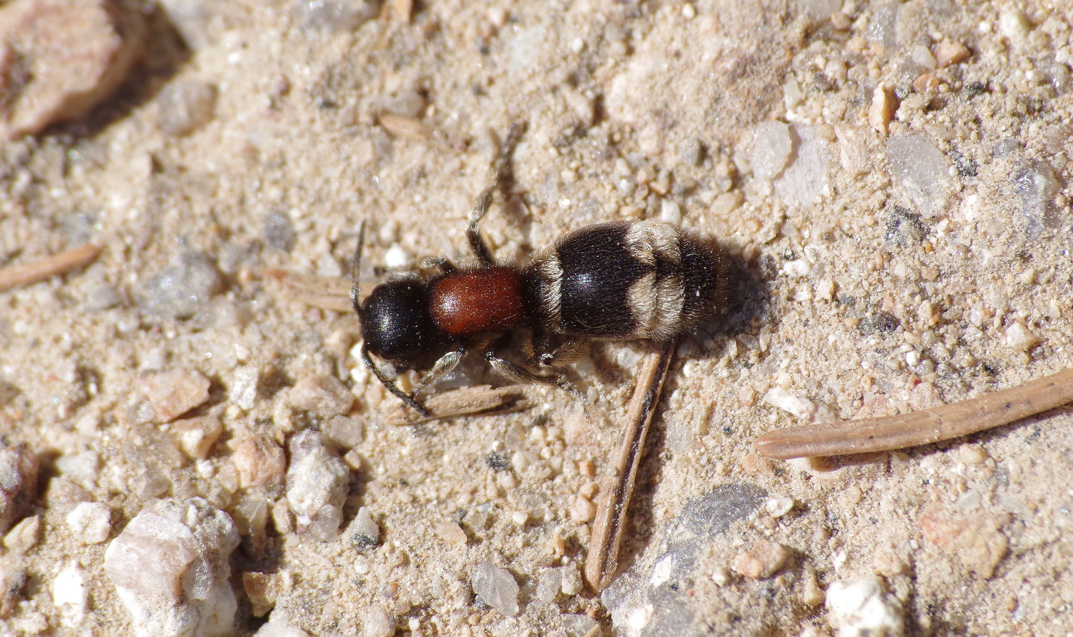 Bezkřídlá samice kodulky horské na cestě u Jizerky.